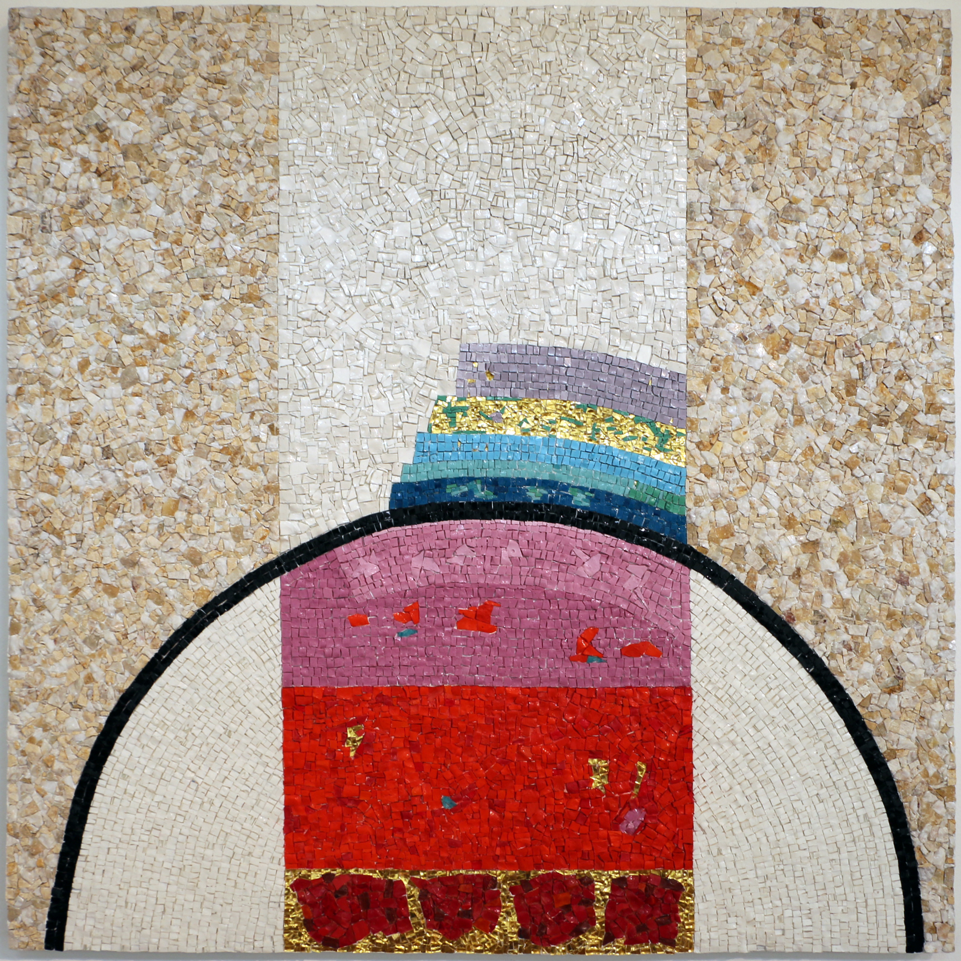 Collezione Mosaici Moderni - NB: Museum explicitly authorized the upload of its contemporary art collection for WLM 2016 (for further info ask WLM Italy organizators). This is a photo of a monument which is part of cultural heritage of Italy.